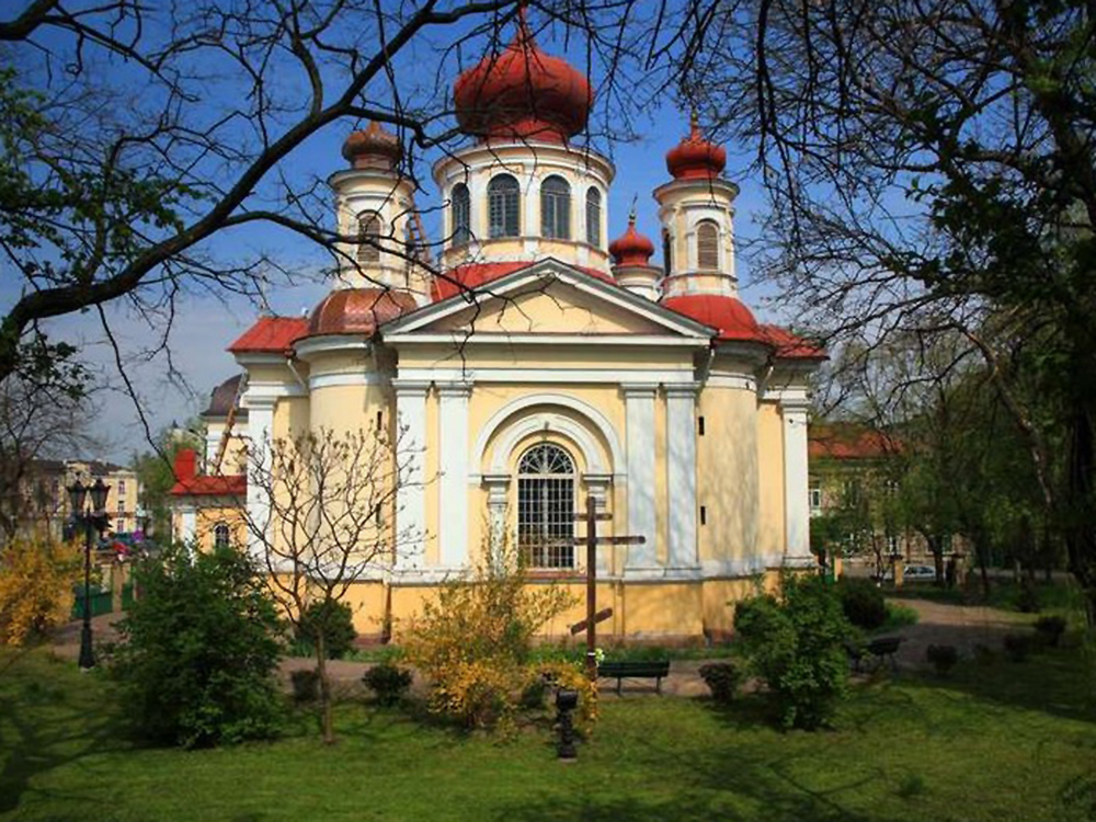 Chełm, Cerkiew, ul. Kopernika